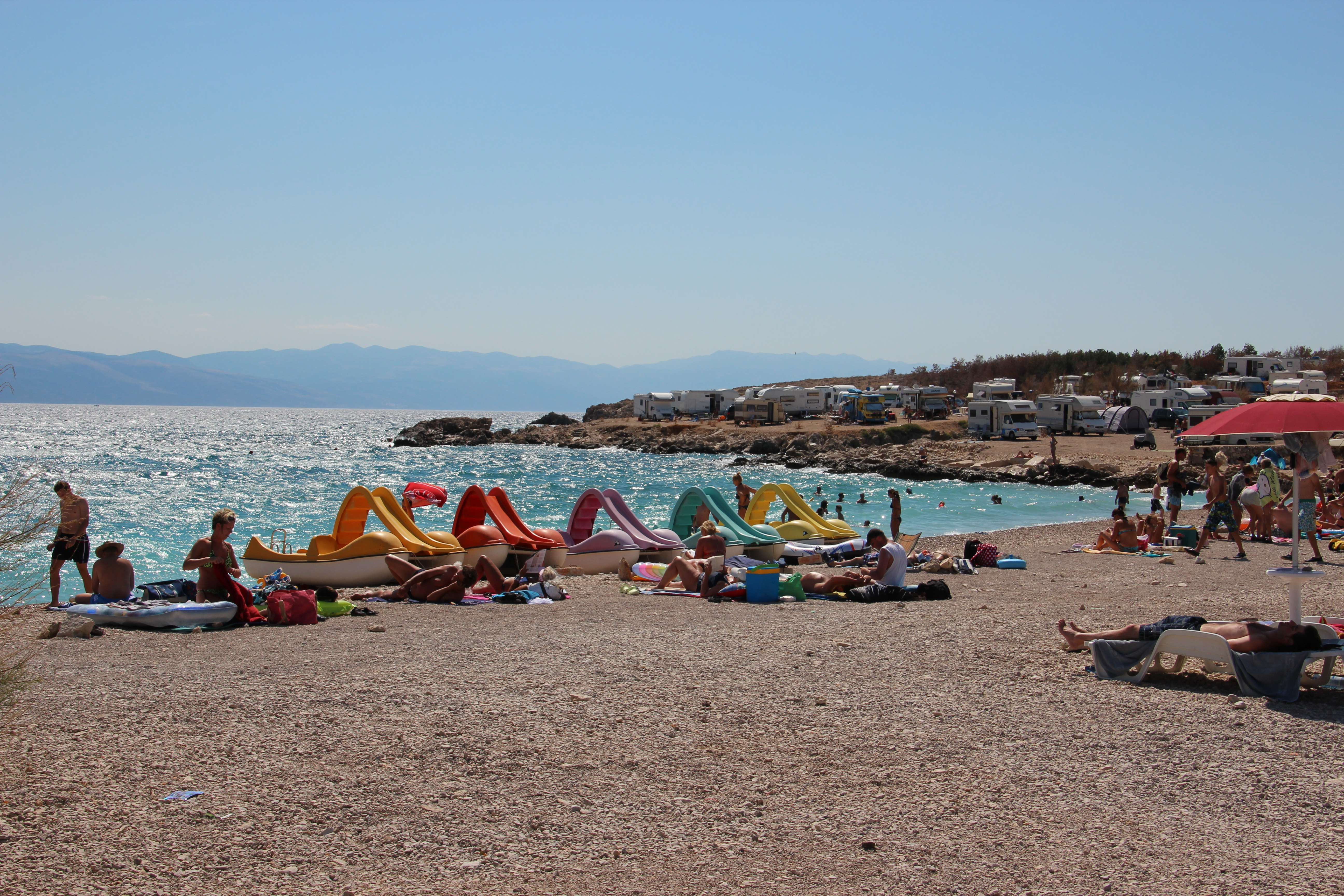 Silo, der Strand (2)